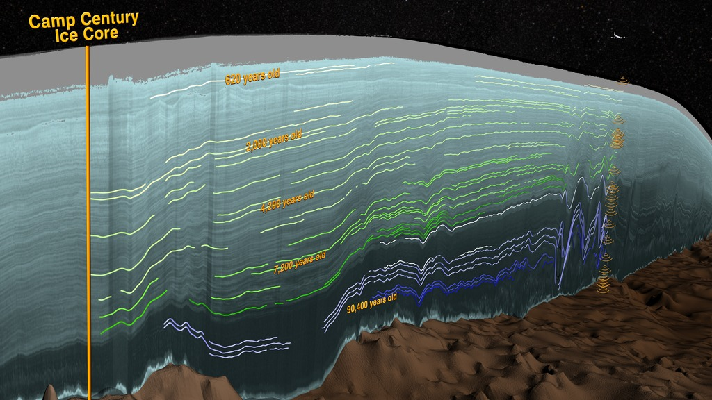 გრენლანდიის მყინვარული საფარის ფენები და მათი ასაკი